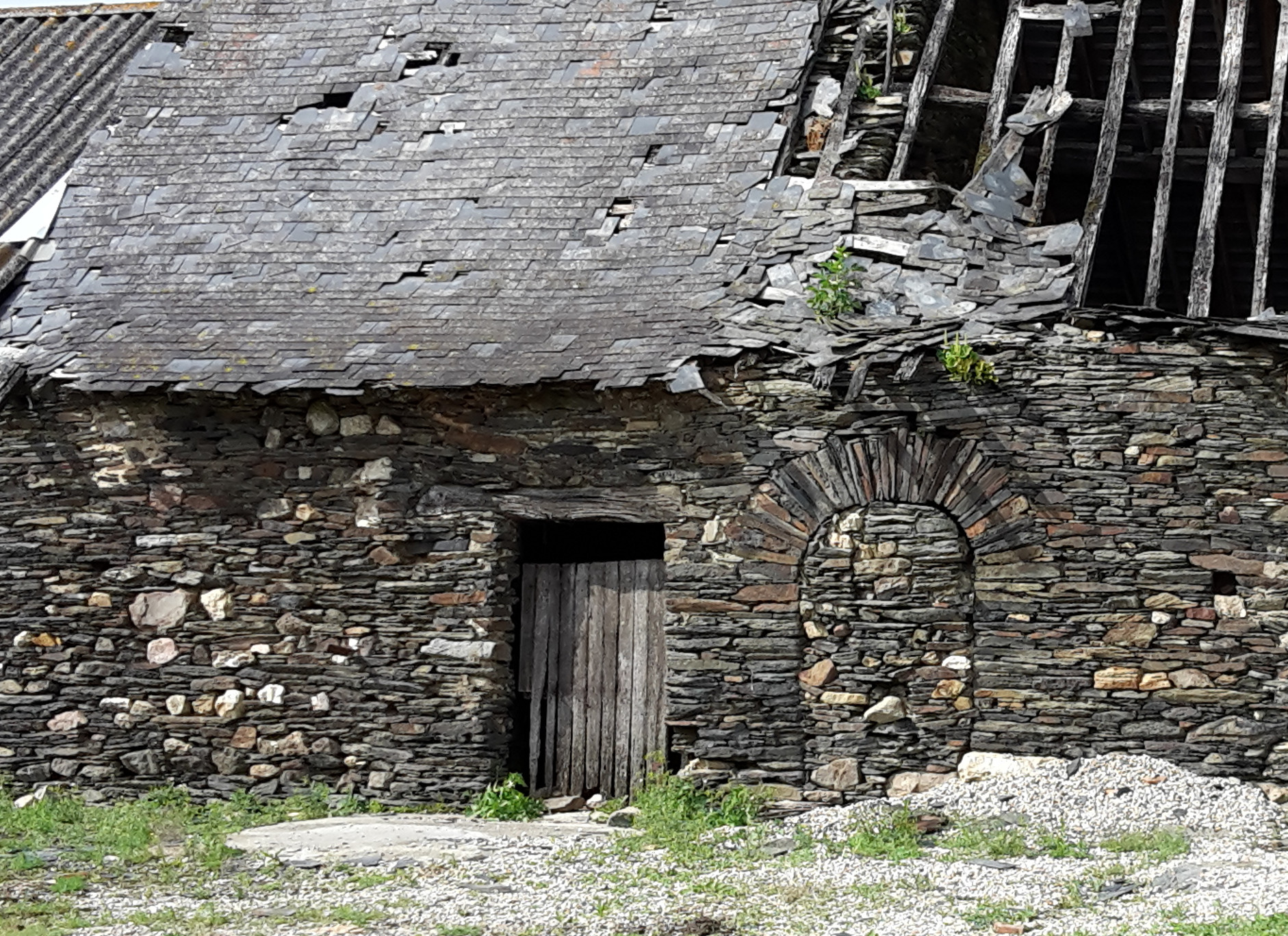 Mur en schiste, Le Pin, Loire-Atlantique, France.